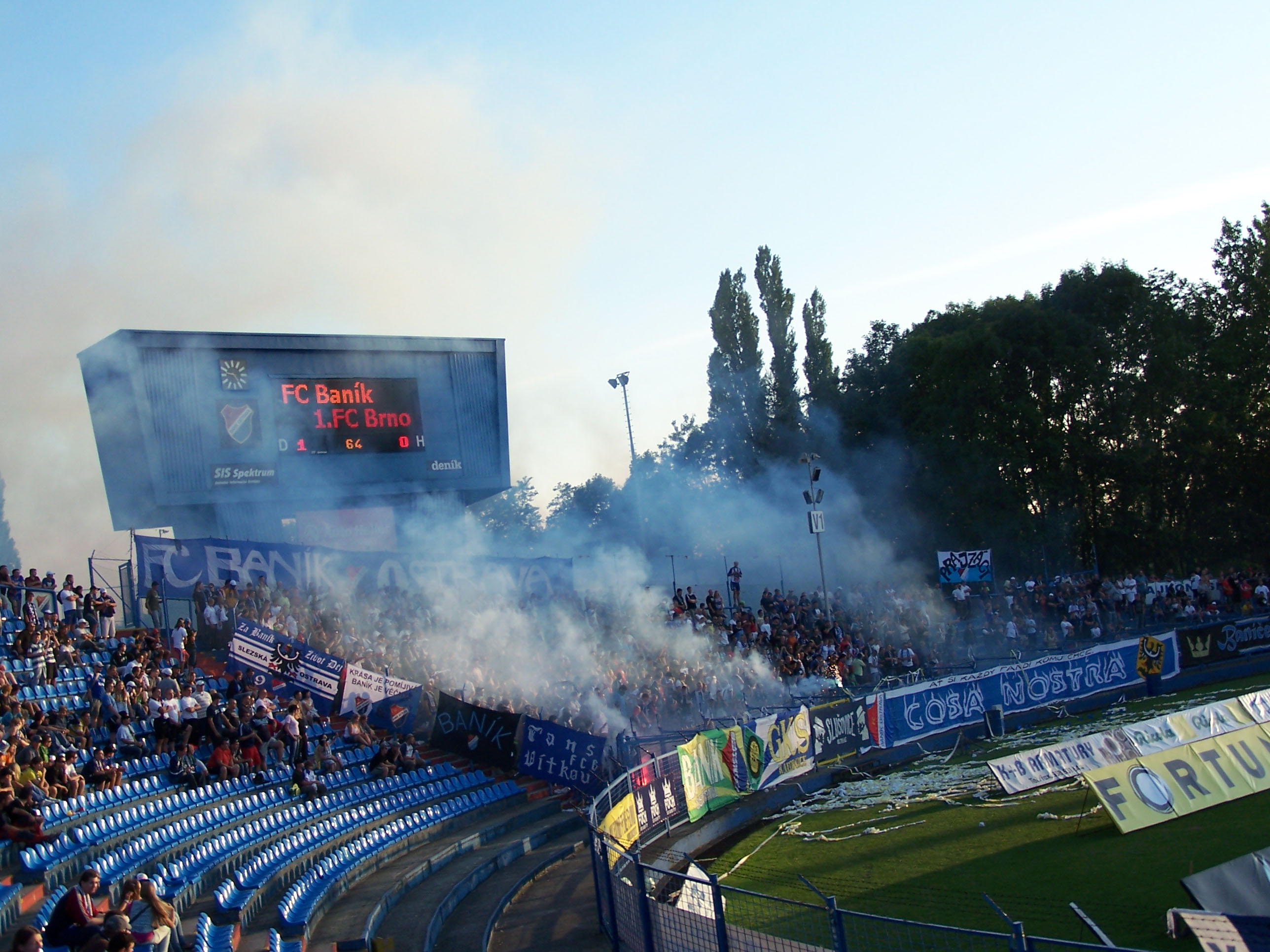 Bazaly Stadium during FC Baník Ostrava - 1. FC Brno match in Ostrava